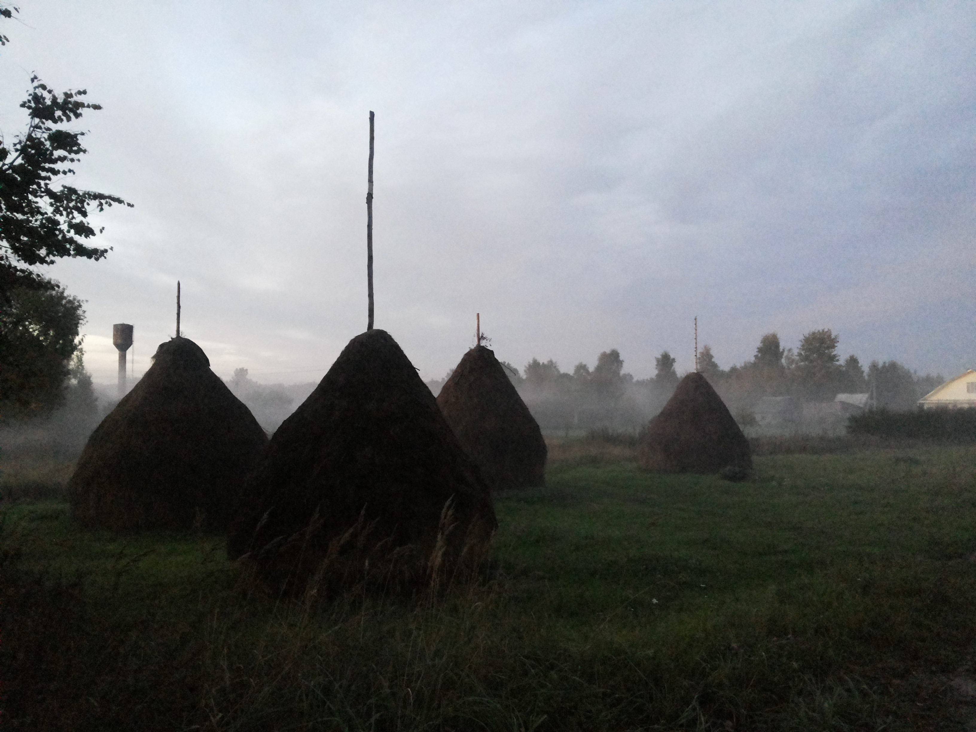 Стога сена в деревне Партизанская Полновской волости Гдовского района Псковской области